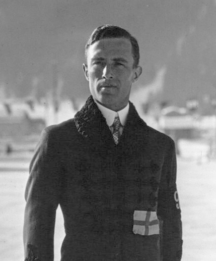 Grafstrom, champion du monde de patinage : [photographie de presse] / Agence Meurisse